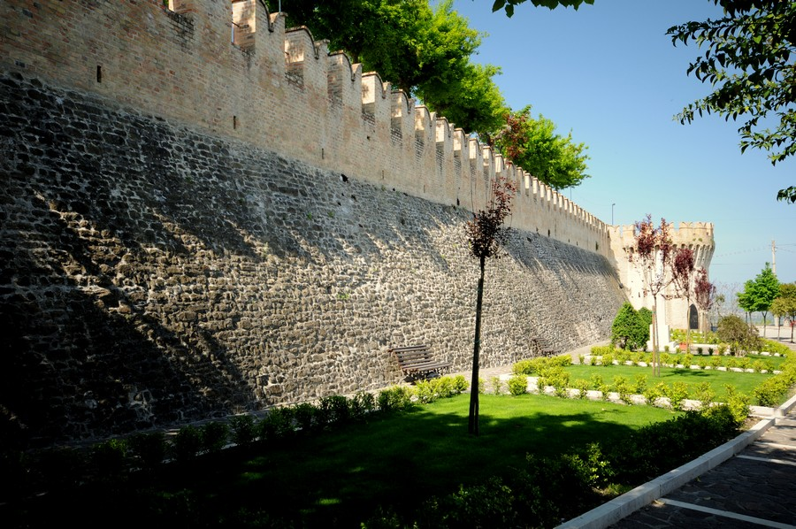 torrione con giardino